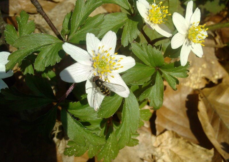 Anemone nemorosa